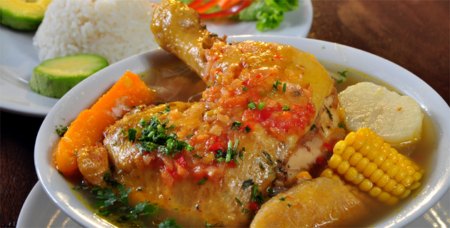 hecho de gallina